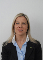 Manuela Lanzarin, politica italiana